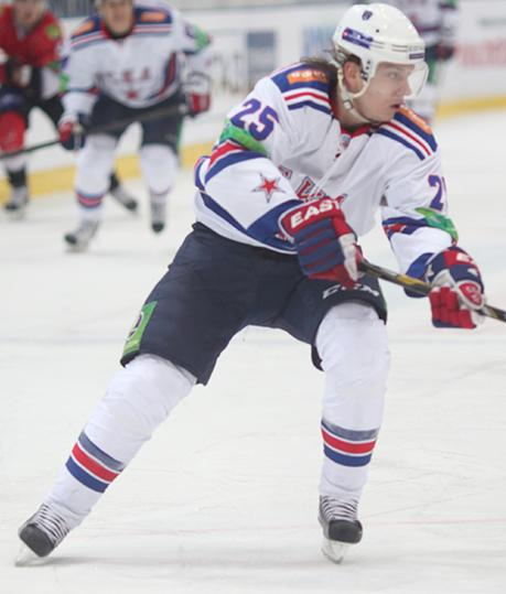 Нападающий СКА Игорь Макаров во время матча чемпионата КХЛ против новокузнецкого «Металлурга» 19 декабря 2012 года.